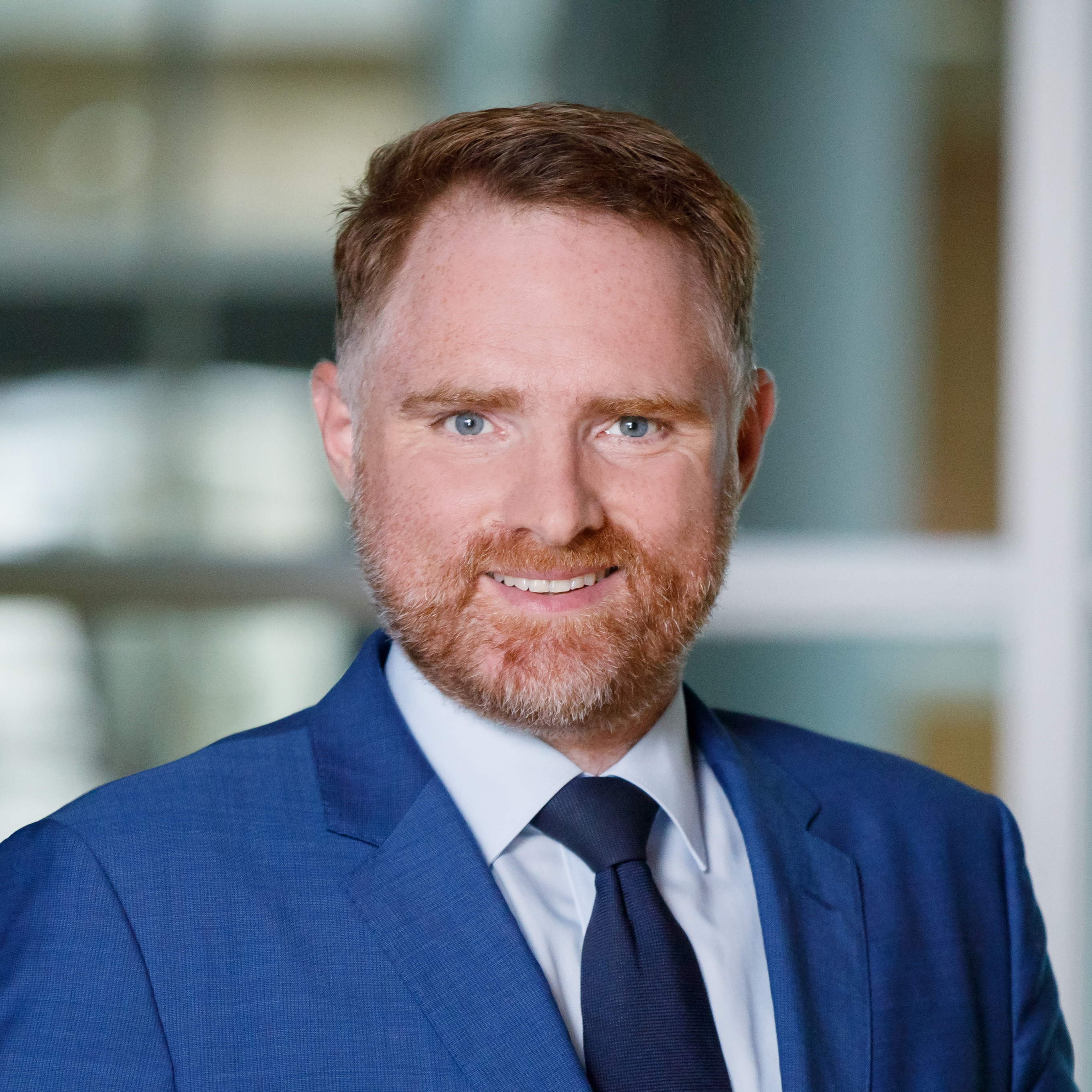 Peter Aumer am 28.06.18 in Berlin im Deutschen Bundestag. / Foto: Tobias Koch (